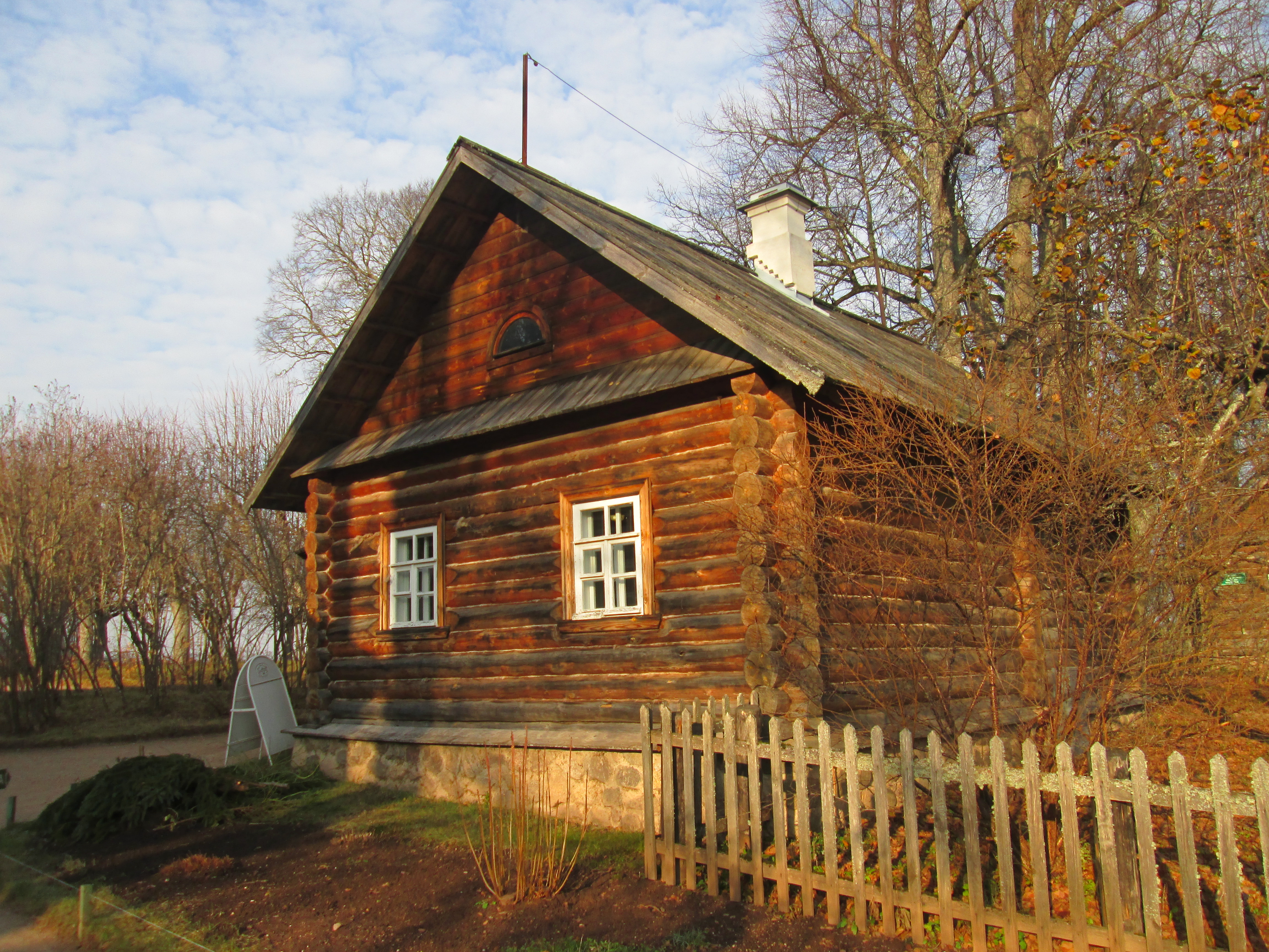 Дом приказчика Михайла Ивановича Калашникова в Михайловском. Воссоздан в середине XX века. В настоящее время в доме располагаются кассы музея